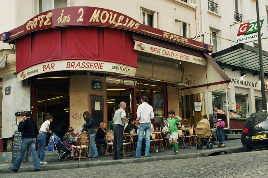 Das Café des 2 Moulins aus dem Film "Le fabuleux destin d'Amélie Poulain"/"Die fabelhafte Welt der Amélie" im Pariser Stadtteil Montmartre (15, Rue Lepic)